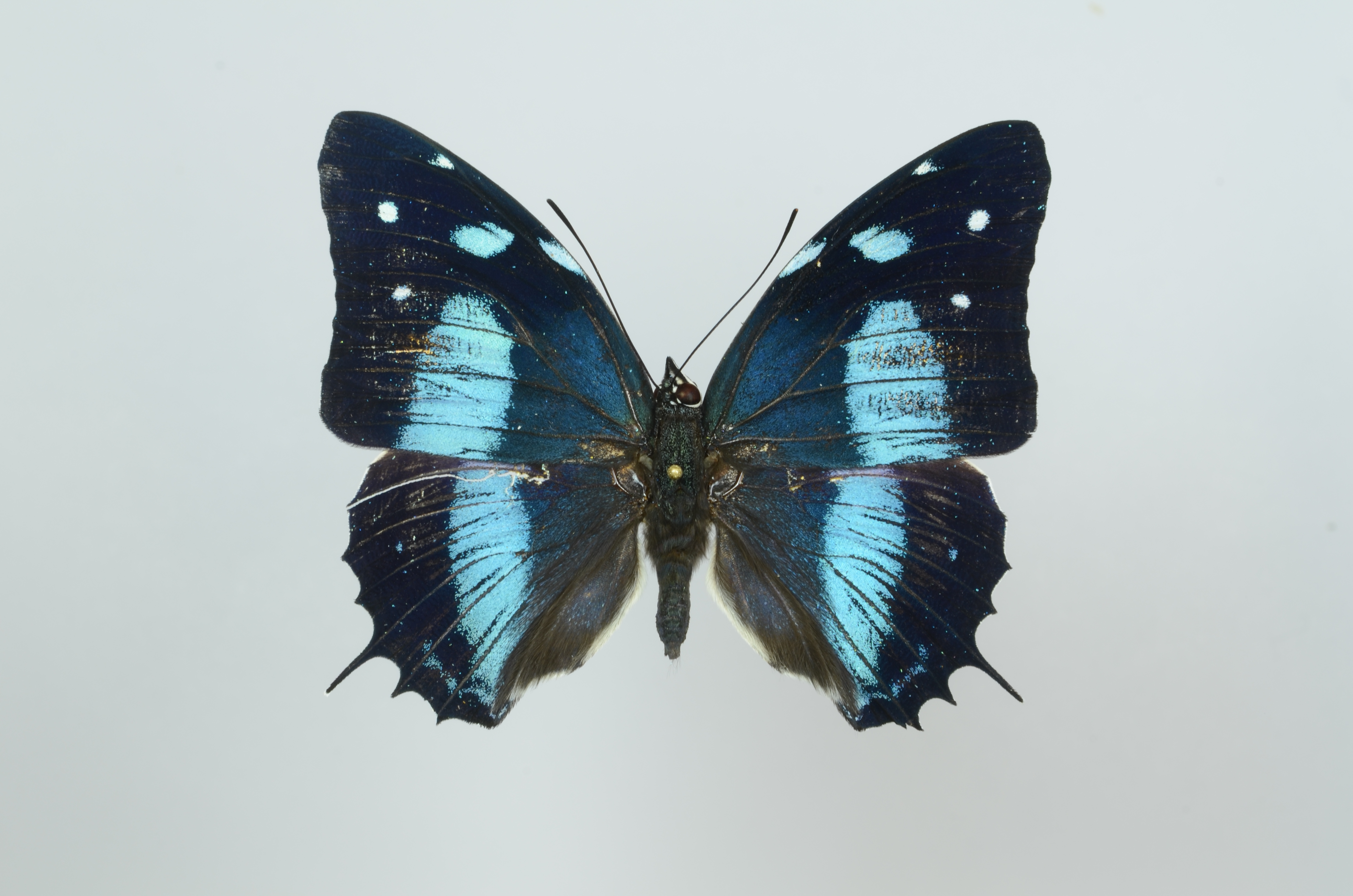 Baeotus amazonicus